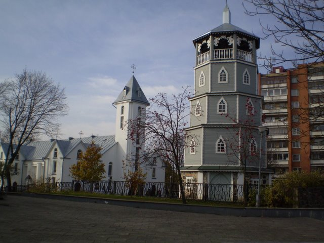 Radviliškio bažnyčios ansamblis, 2009 04 04